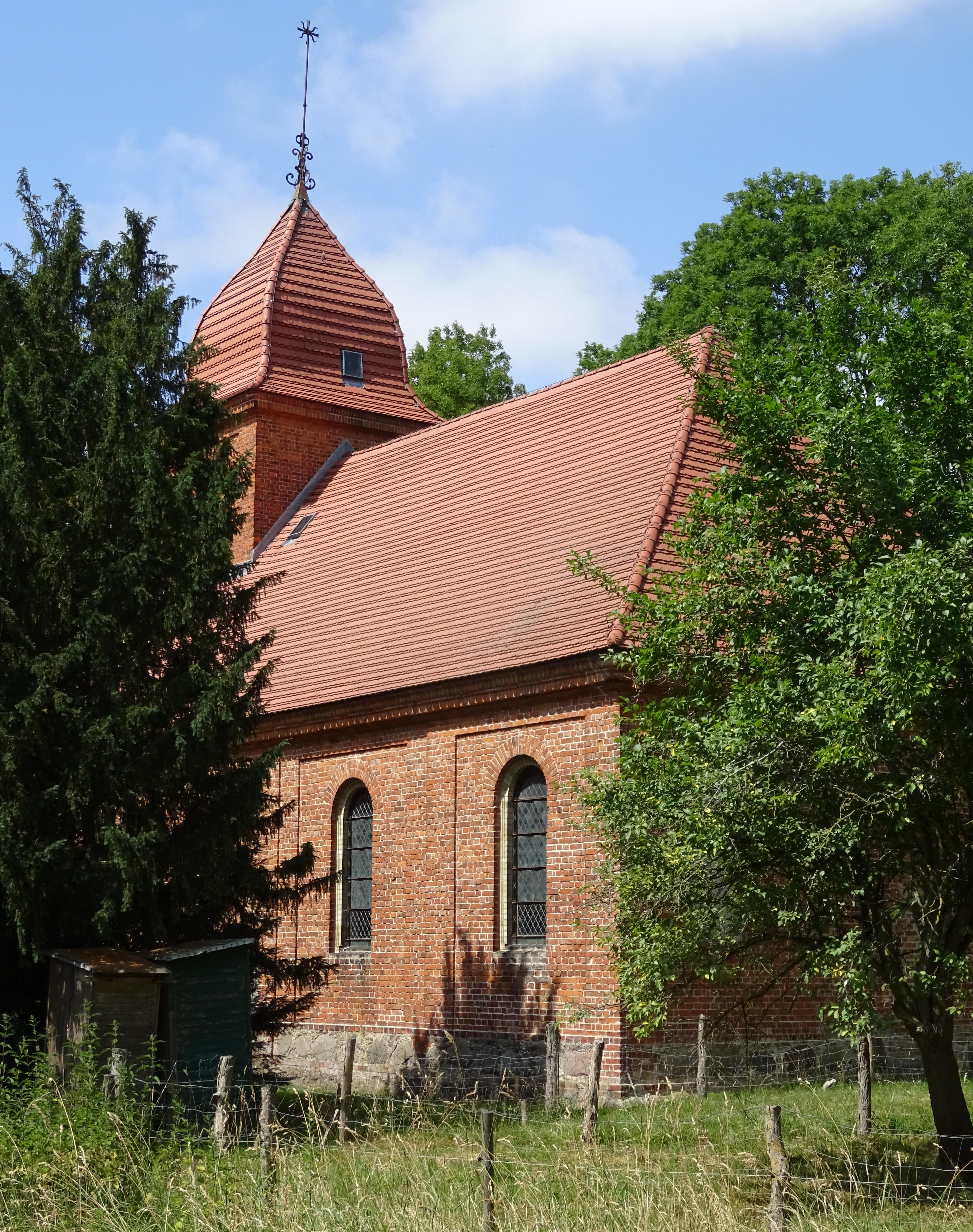 Dorfkirche Borgfeld, Kirche fotografiert von Südwest